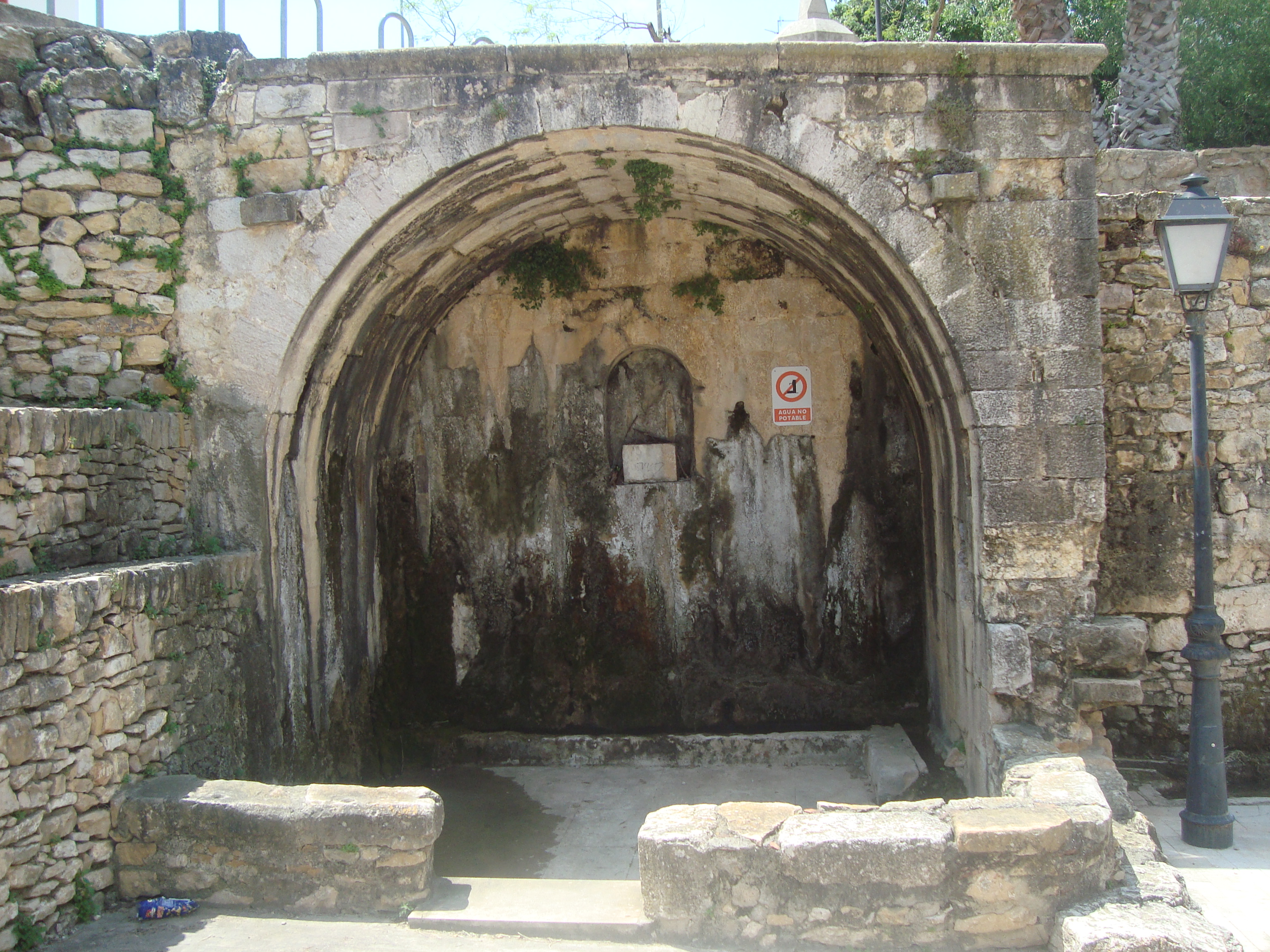 La Font de Llavà